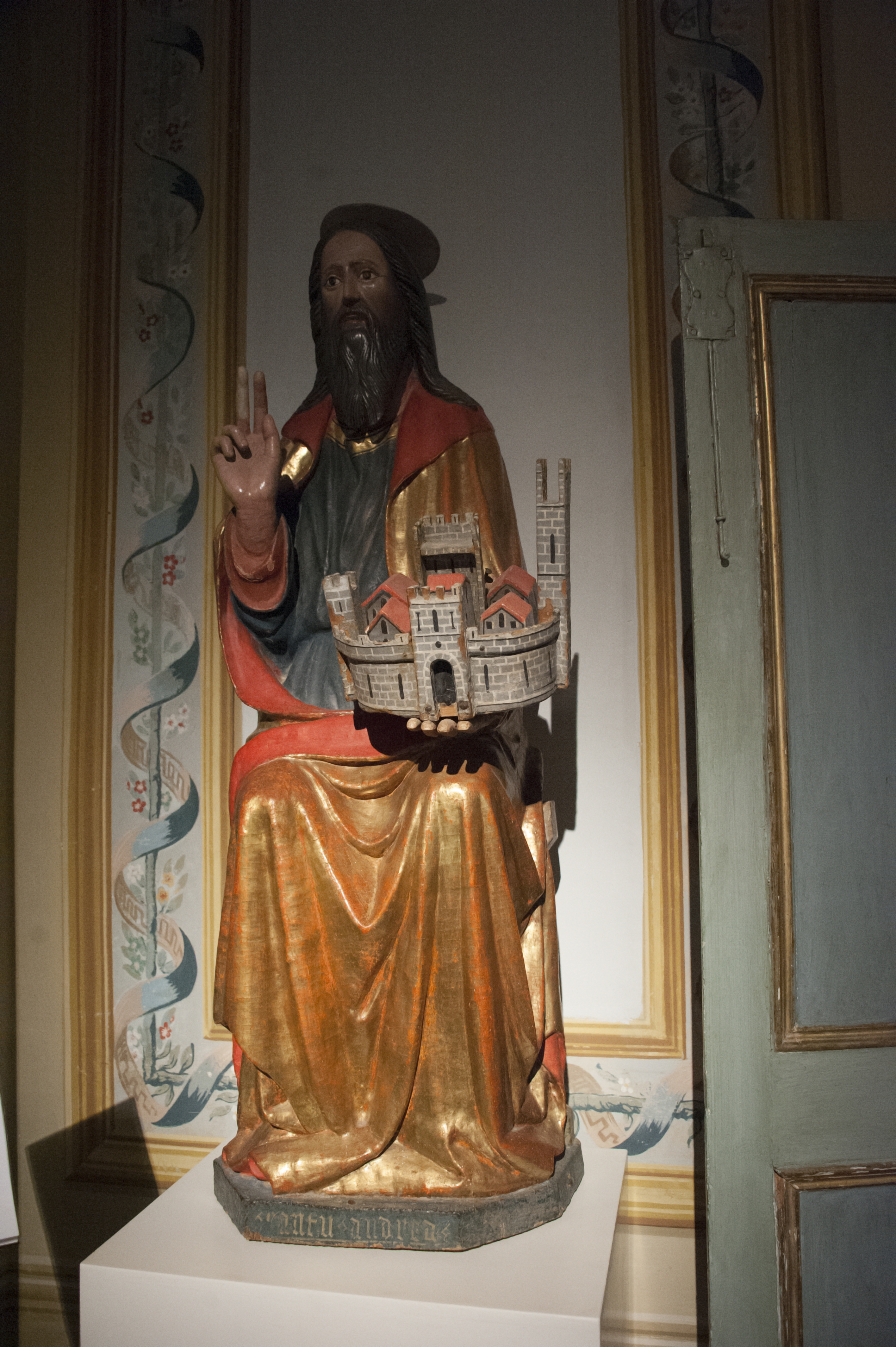 Statua lignea di Sant'Andrea, un tempo collocata nella chiesa di San Salvatore a Campi. Attualmente al Museo diocesano di Spoleto